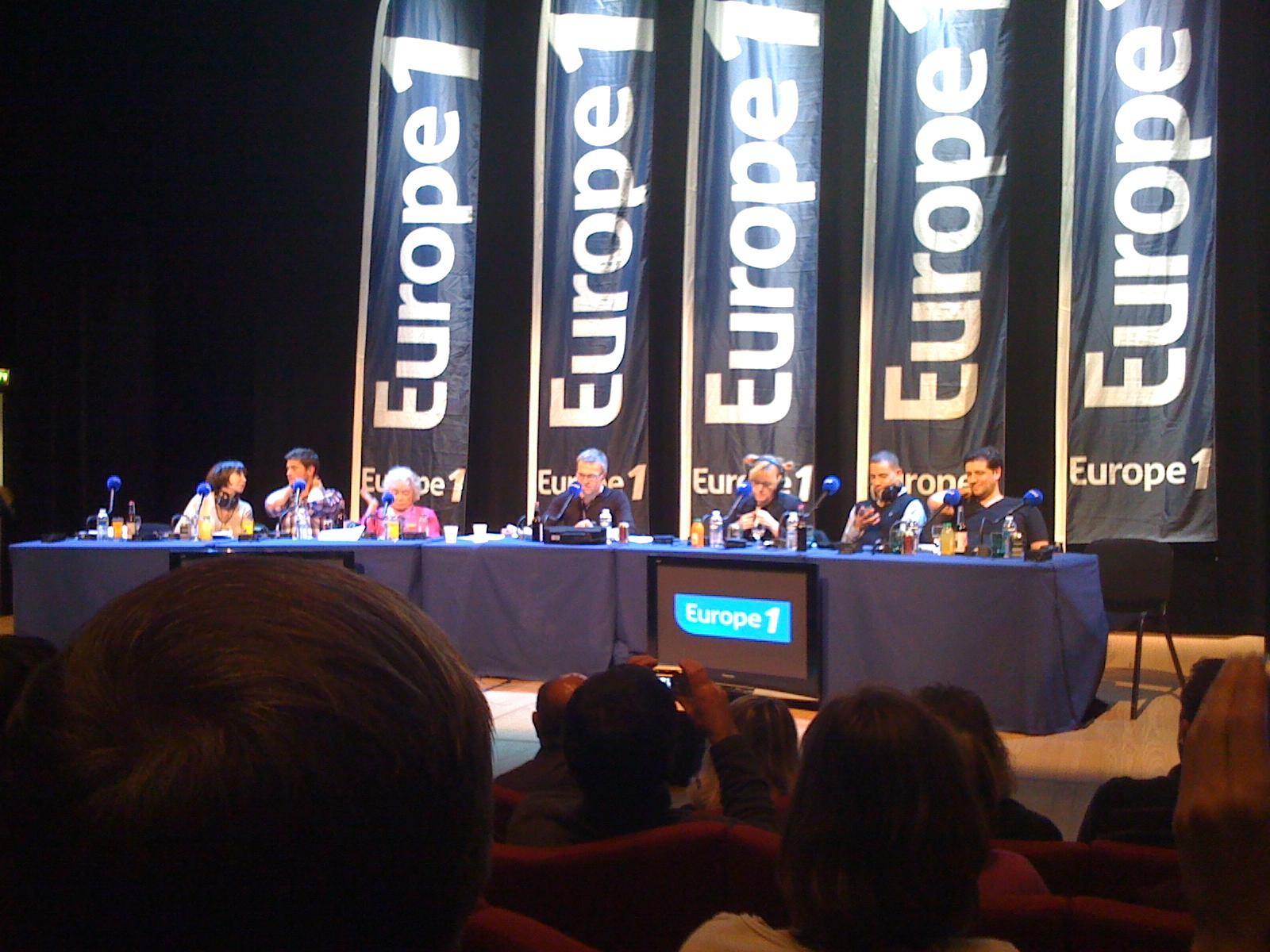 Plateau de l'émission On va s'gêner d'Europe 1, délocalisée aux Champs libres, à Rennes, le 26 janvier 2011. De gauche à droite : Danièle Évenou, Christophe Beaugrand, Claude Sarraute, Laurent Ruquier, Caroline Diament, Steevy Boulay et Titoff.